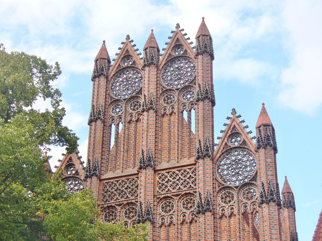 Berlin - Maerkisches Museum